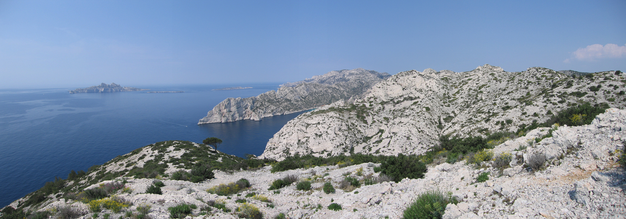 L'archipel de Riou et la calanque de Sormiou